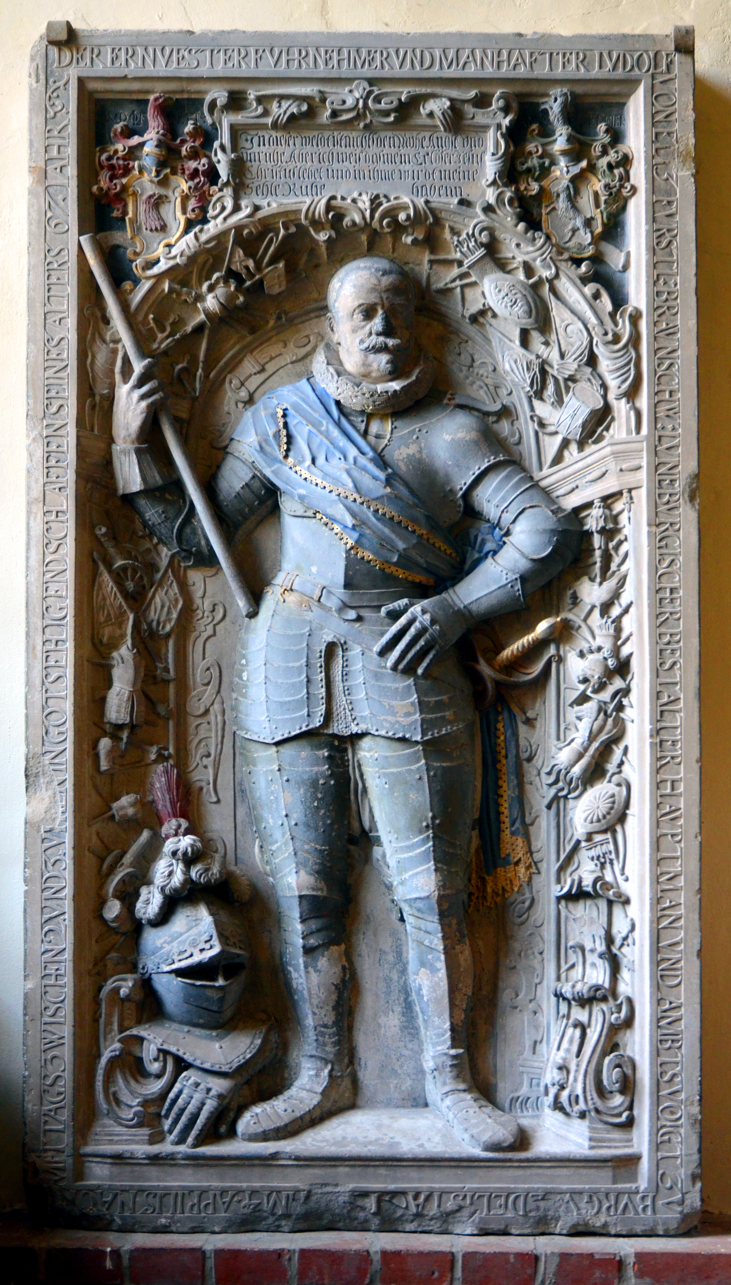 Farbig bemalte und an der Wand der St. Petri-Kirche in der St.-Petri-Kirche (Burgwedel)St.-Petri-Kirche in Burgwedel aufgestellte Grabplatte des „Ludolf von Eltz“ der von 1590 bis 1626 als braunschweig-lüneburgischer Hauptmann und Amtsvogt von Burgwedel wirkte ...